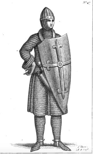 Elias I, Count of Maine